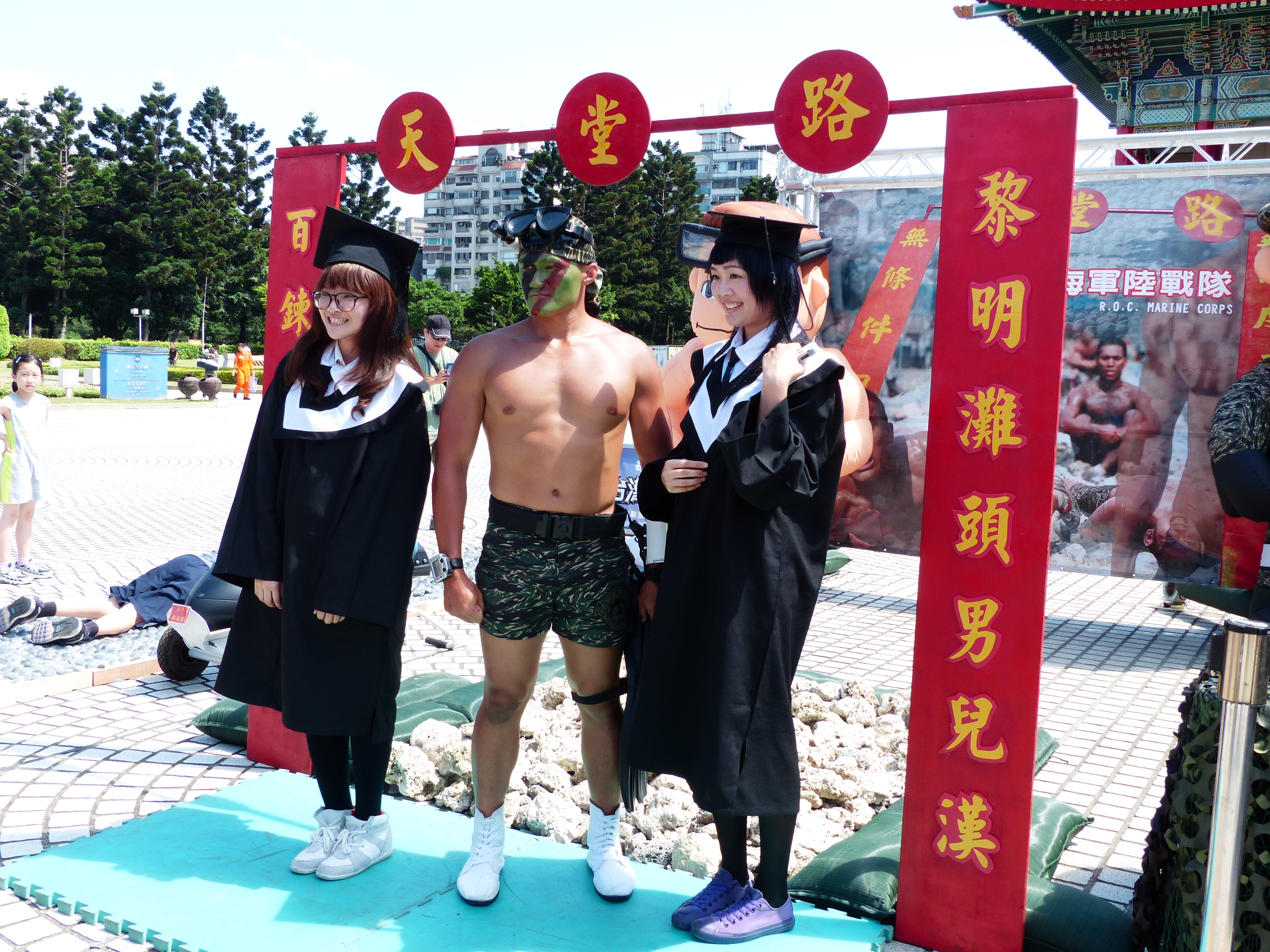 特戰部隊體驗展6月8日下午，兩位大學女畢業生與海軍陸戰隊健兒，在海軍陸戰隊名物「天堂路」小段樣品前合影留念。